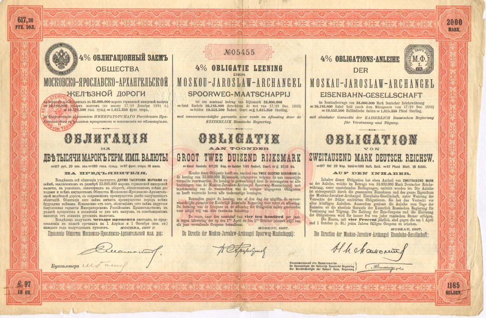 Общество Московско-Ярославско-Архангельской железной дороги. 4% облигационный заем 1897 г., облигация на 2 000 марок германской имперской валюты. Москва, 1897 г.